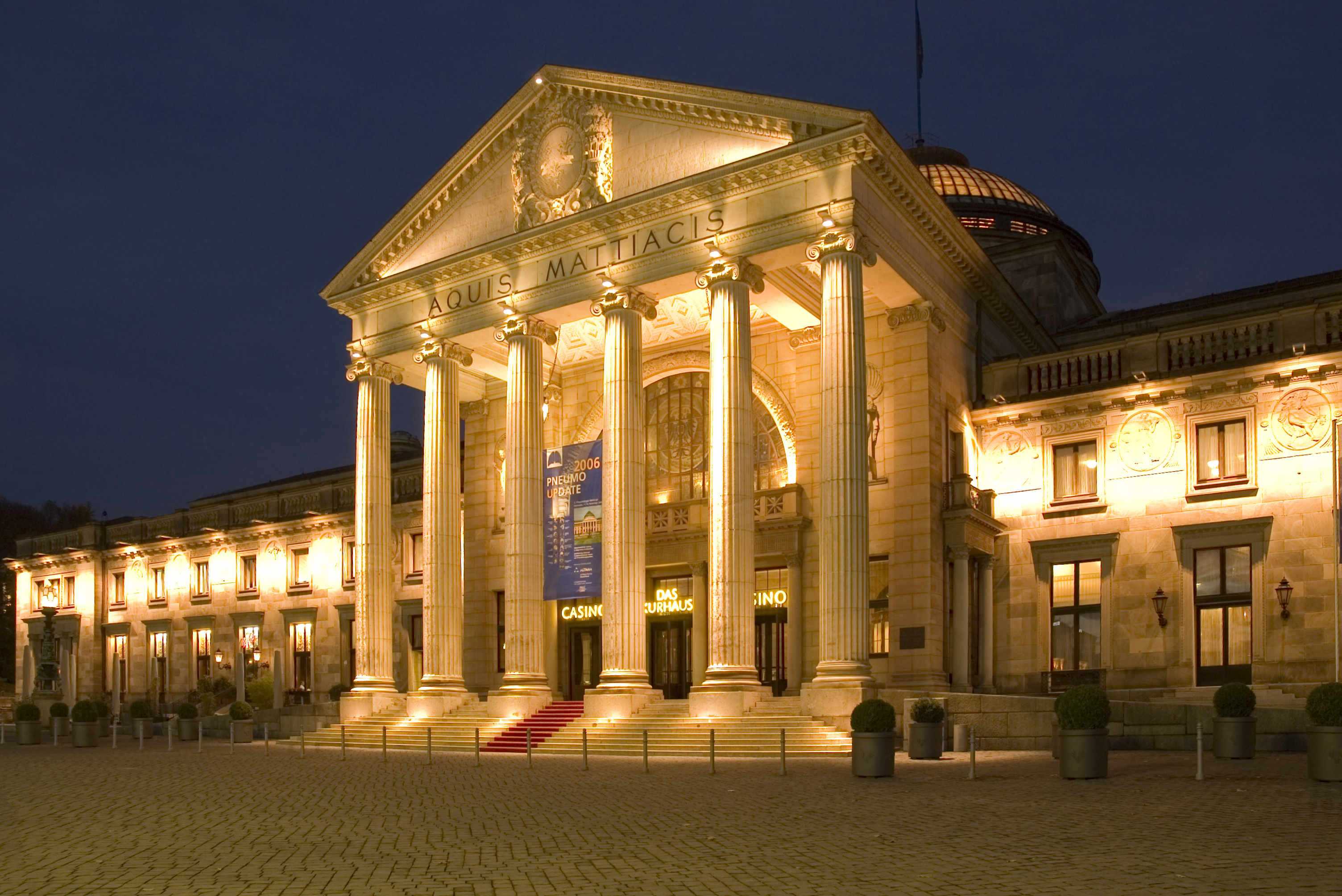 Wiesbadener Kurhaus bei Nacht